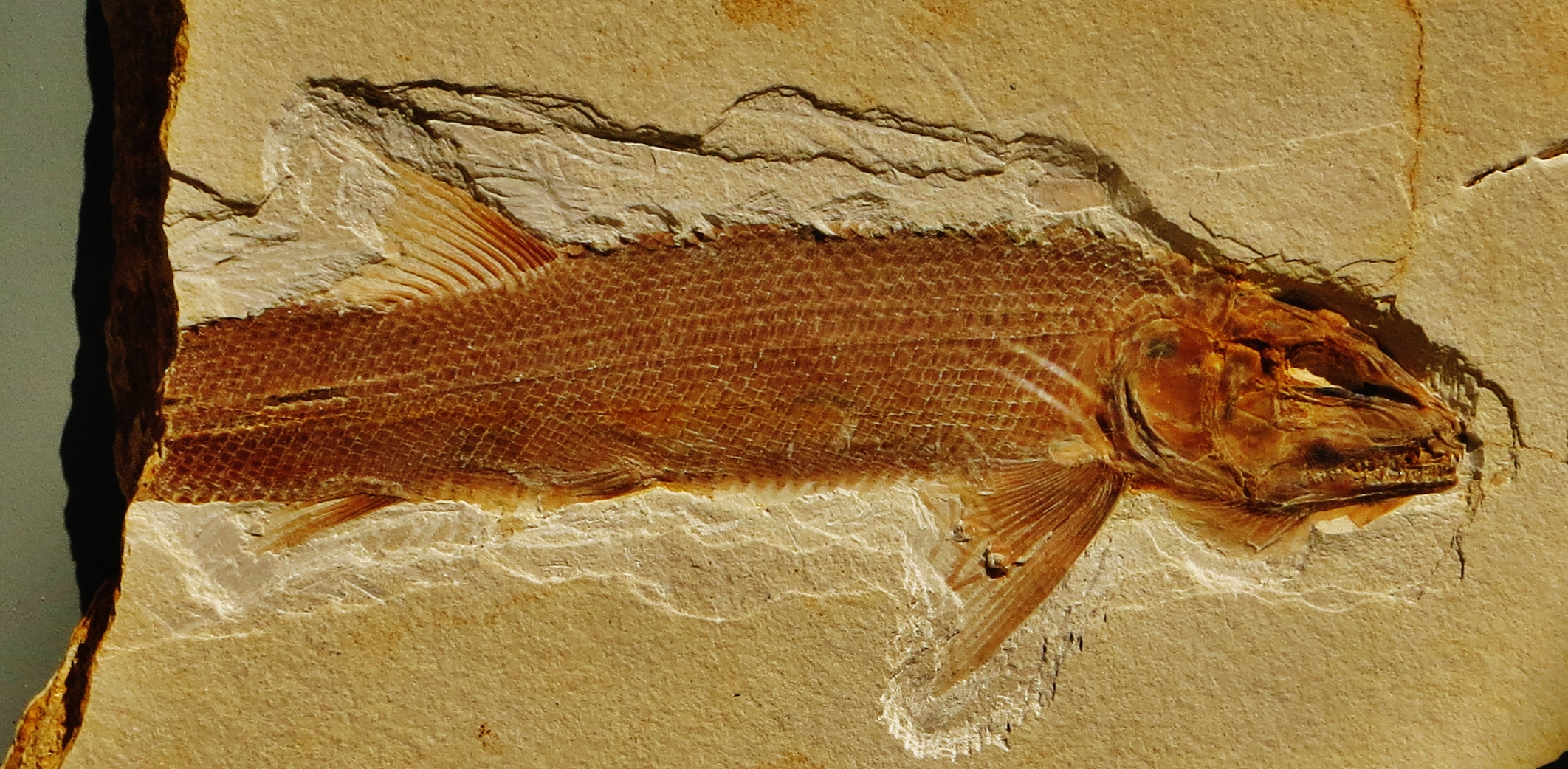 Took the picture at Jura-Museum, Eichstaett